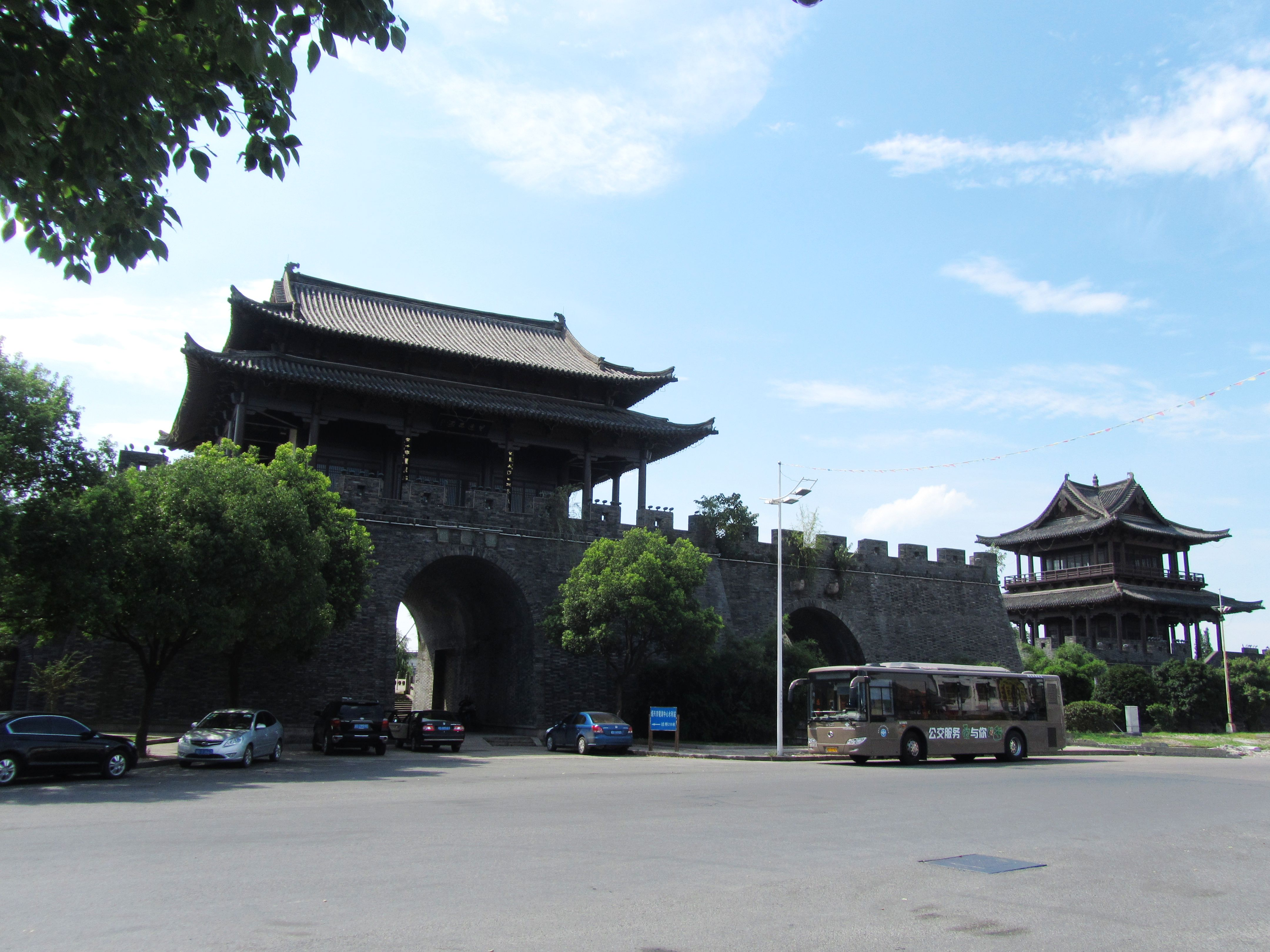 绍兴迎恩门，东侧全景。